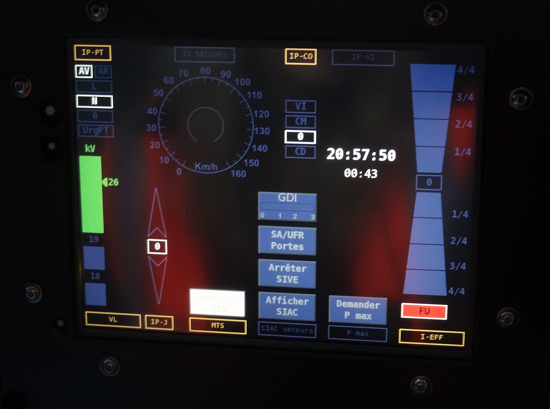 Ecran de contrôle et de commande en cabine d'une Z 50000, France.